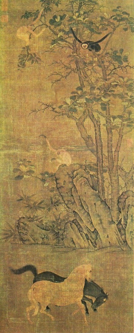 Anonyme Xe siècle; attribué à Han Gan VIIIe siècle: Singes et chevaux - rouleau vertical (rogné à l'extrémité supérieure) - Encre et couleurs sur soie - (L. 48,3cm). Taichung (Formose), collection du Musée du Palais.